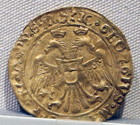 Palazzo Massimo alle Terme